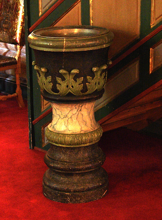 Døbefont i Solum Kirke, Telemark